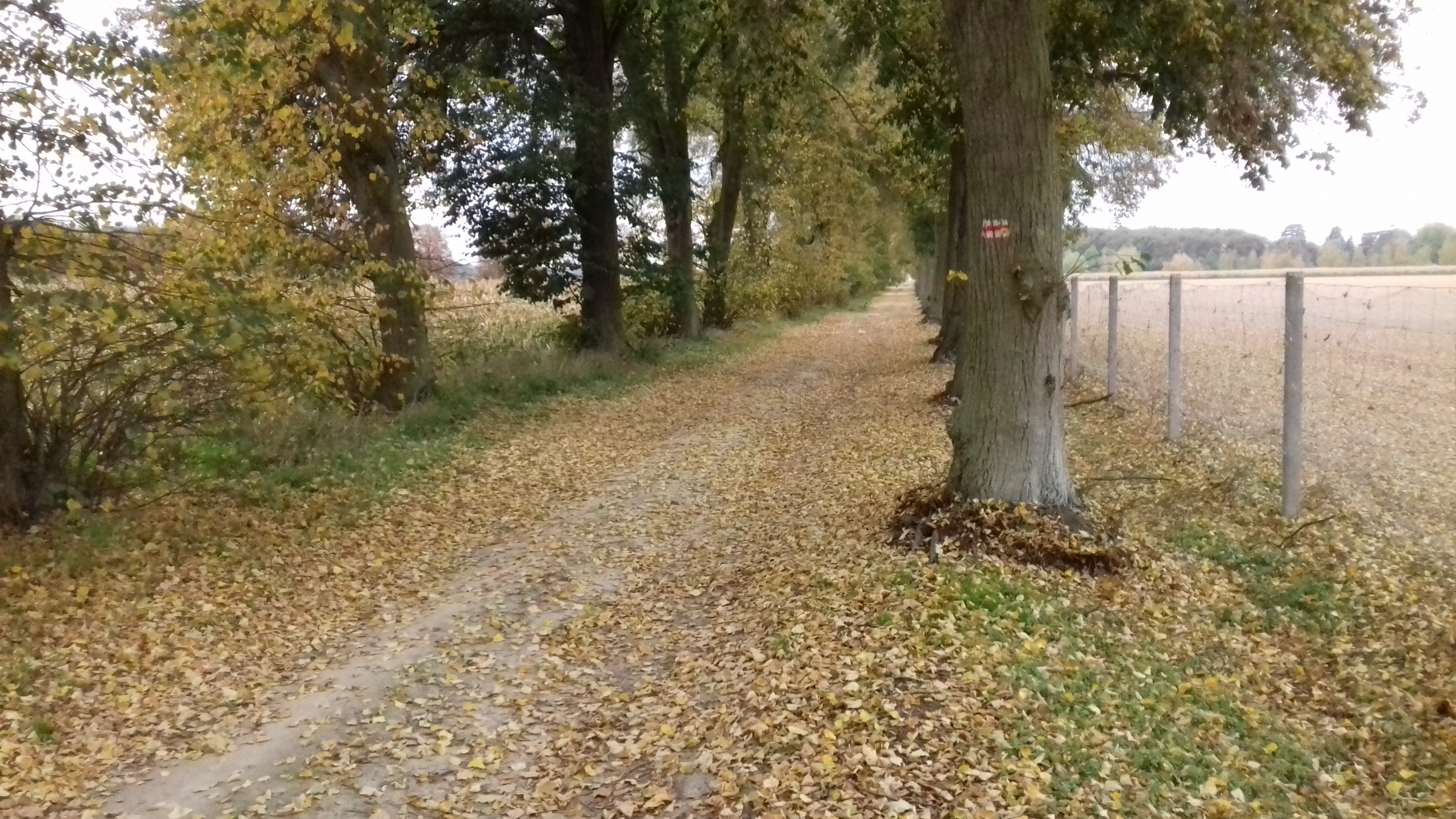 Szlak pieszy nr 186 (czerwony) w okolicach jeziora Jeziory Wielkie